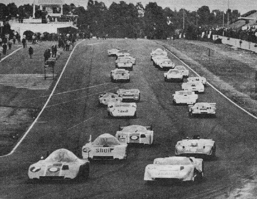 Revista Automundo Nº 292 del 8 de diciembre de 1970. Inicio de una de las carreras de Buenos Aires 1970 de Sport Prototipo Argentino.